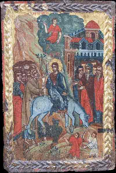 Влегување во Ерусалим, XVII век. Црква Св. Ѓорѓија во Струга, Македонија